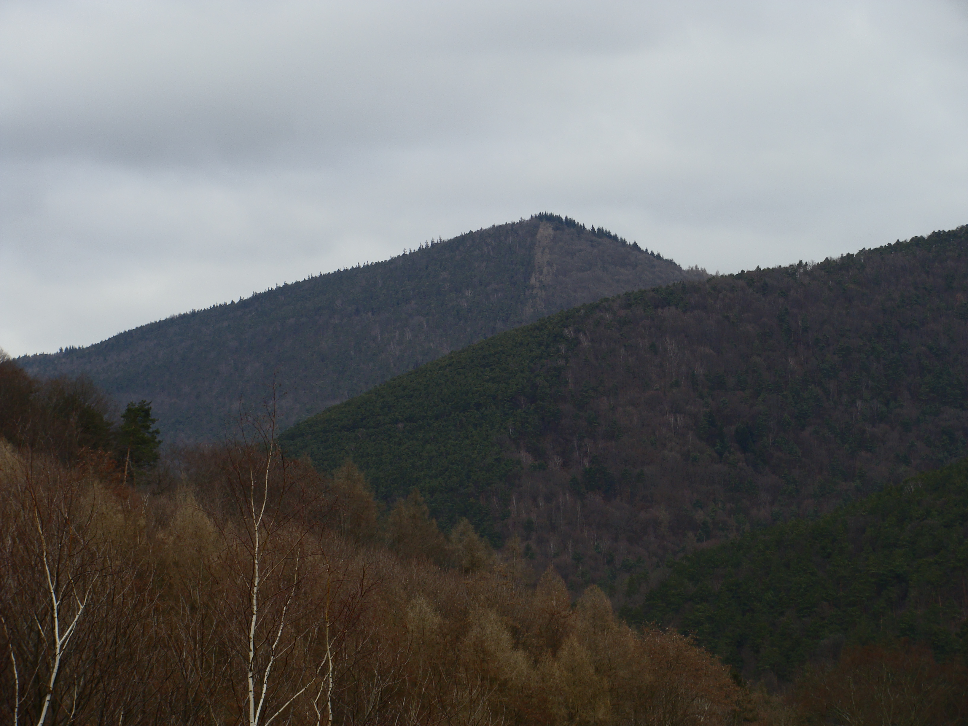 Kesselberg im Pfälzerwald